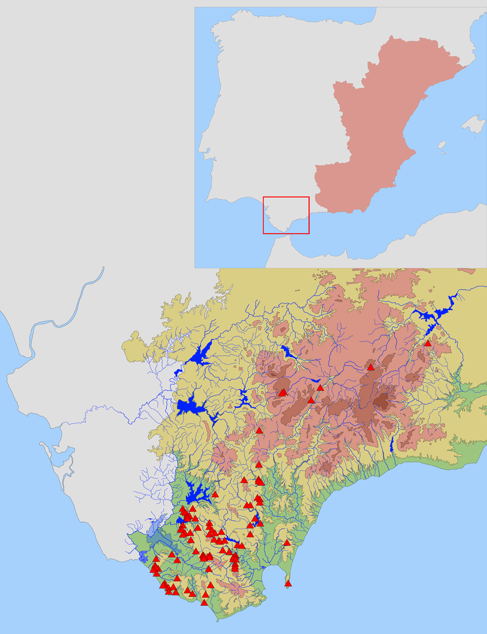 Mapa indicativo de los principales abrigos con pinturas rupestres del extremo sur de la Península ibérica con la topografía de la región. Se incluye su localización (rojo) en la Península ibérica y su situación respecto al denominado Arte rupestre del Arco mediterráneo (rosa).